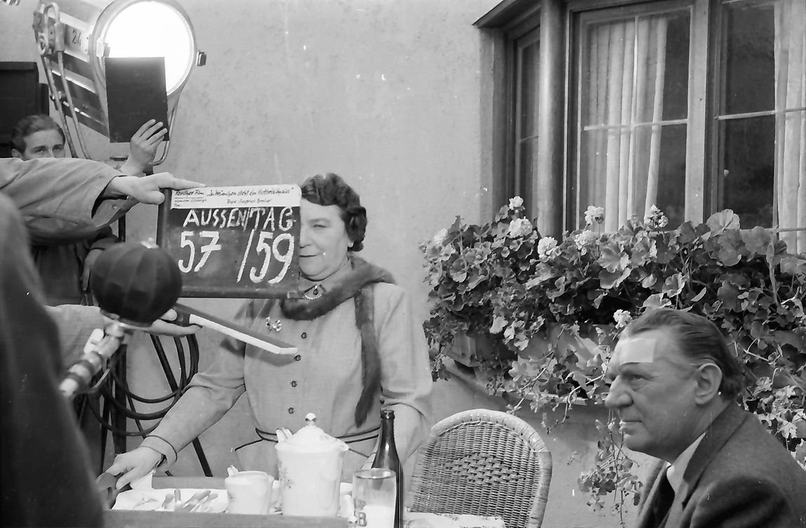 München: Dreharbeiten zu dem Film In München steht ein Hofbräuhaus; Liesl Karlstadt als Wirtin des Hofbräuhauses; rechts: Carl Wery